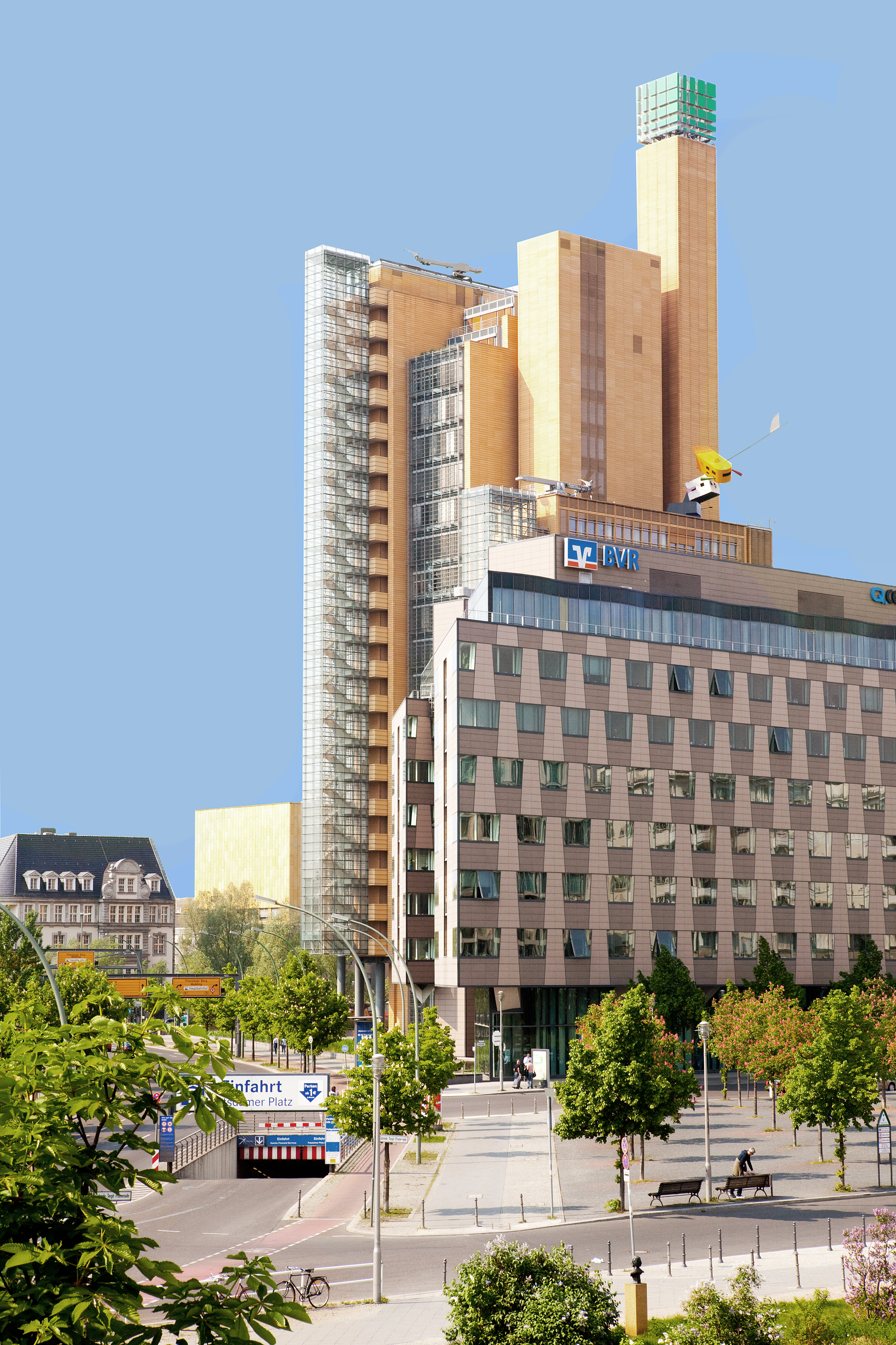 BVR Gebäude